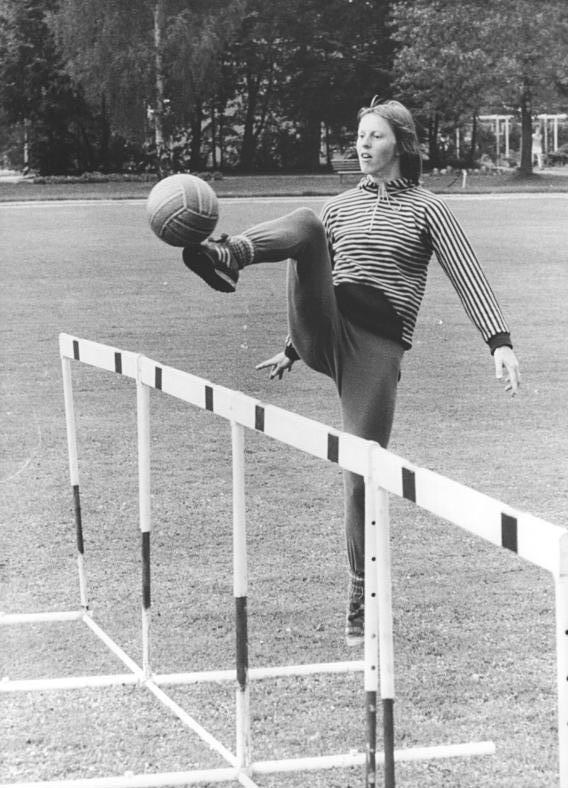 Rosemarie Ackermann ADN-ZB Reiche 24.8.78 Berlin: Hoch hinaus möchte Rosemarie Ackermann (DDR) bei den am 29.8. beginnenden Leichtathletik-Europameisterschaften in Prag. Daß die Cottbuserin, die am 16.8.77 als erste Frau der Welt im Hochsprung die 2-m-Grenze überquert hatte, auch das runde Leder gekonnt beherrscht, davon konnte sich unser Fotoreporter beim Abschlußtraining überzeugen. Information added by Wikimedia users.* Rosemarie Ackermann